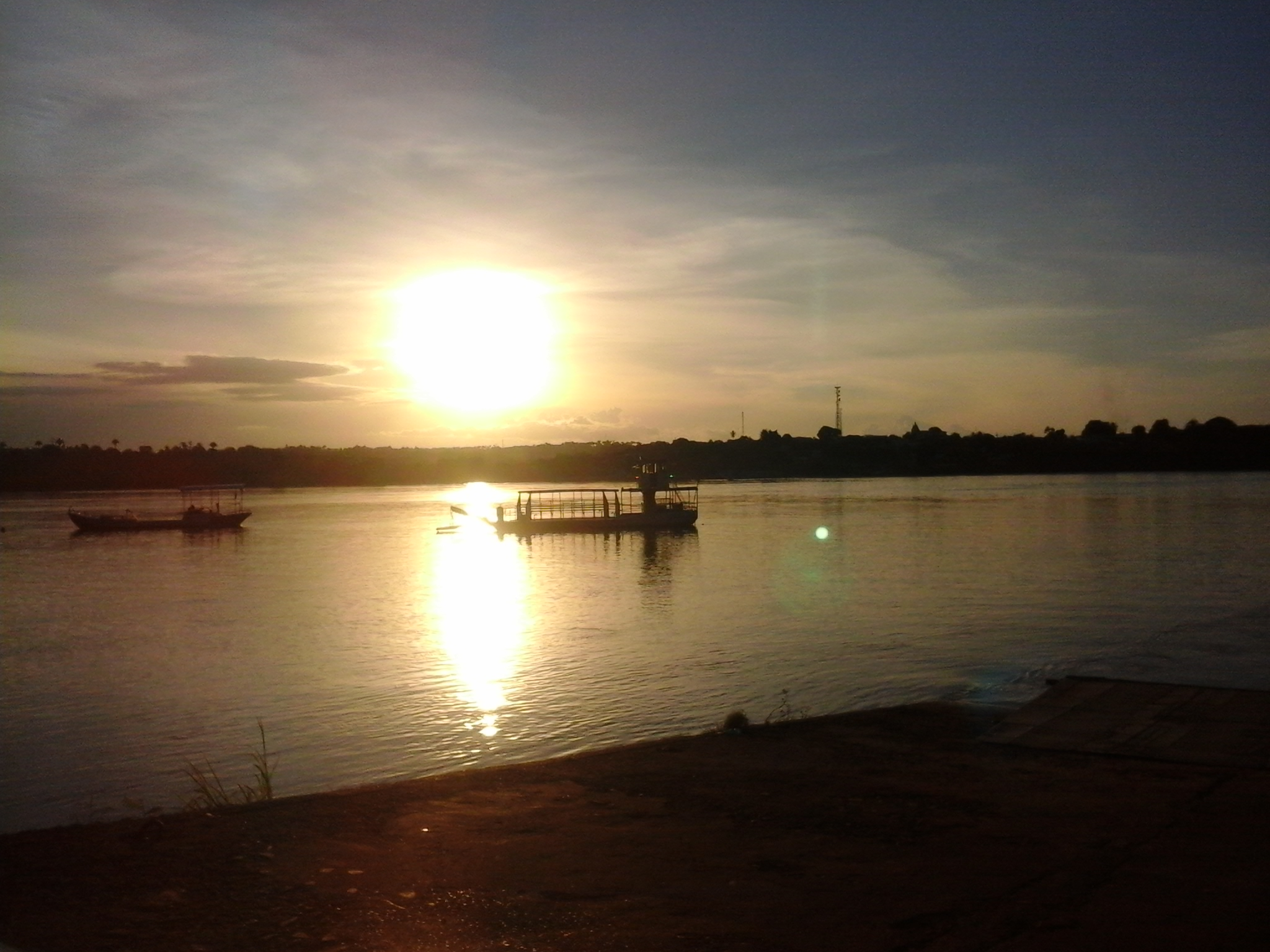 Um final de tarde com o sol refletindo sobre as águas do rio Tocantins, entre os municípios de Porto Franco - MA e Tocantinópolis - TO. Em primeiro plano, a paisagem antrópica contrasta com a paisagem natural aos fundos (Mata ciliar) misturando-se com a urbanização de Tocantinópolis - TO.